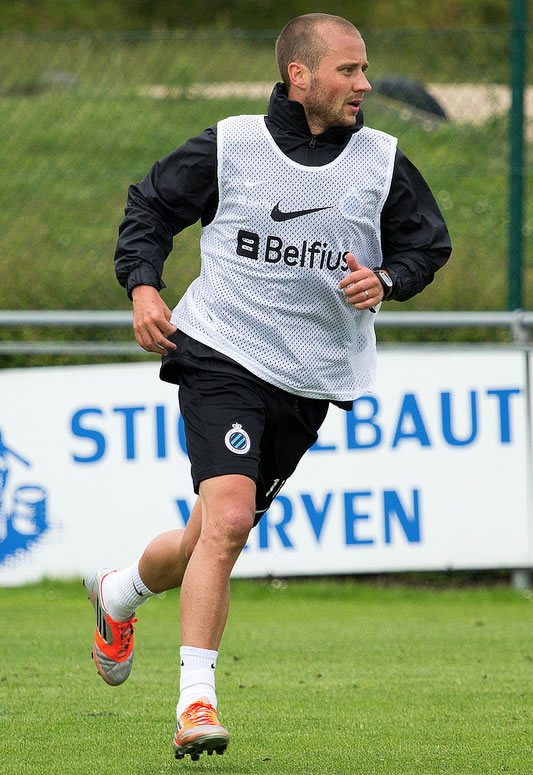 Jonathan Blondel, speler van Club Brugge